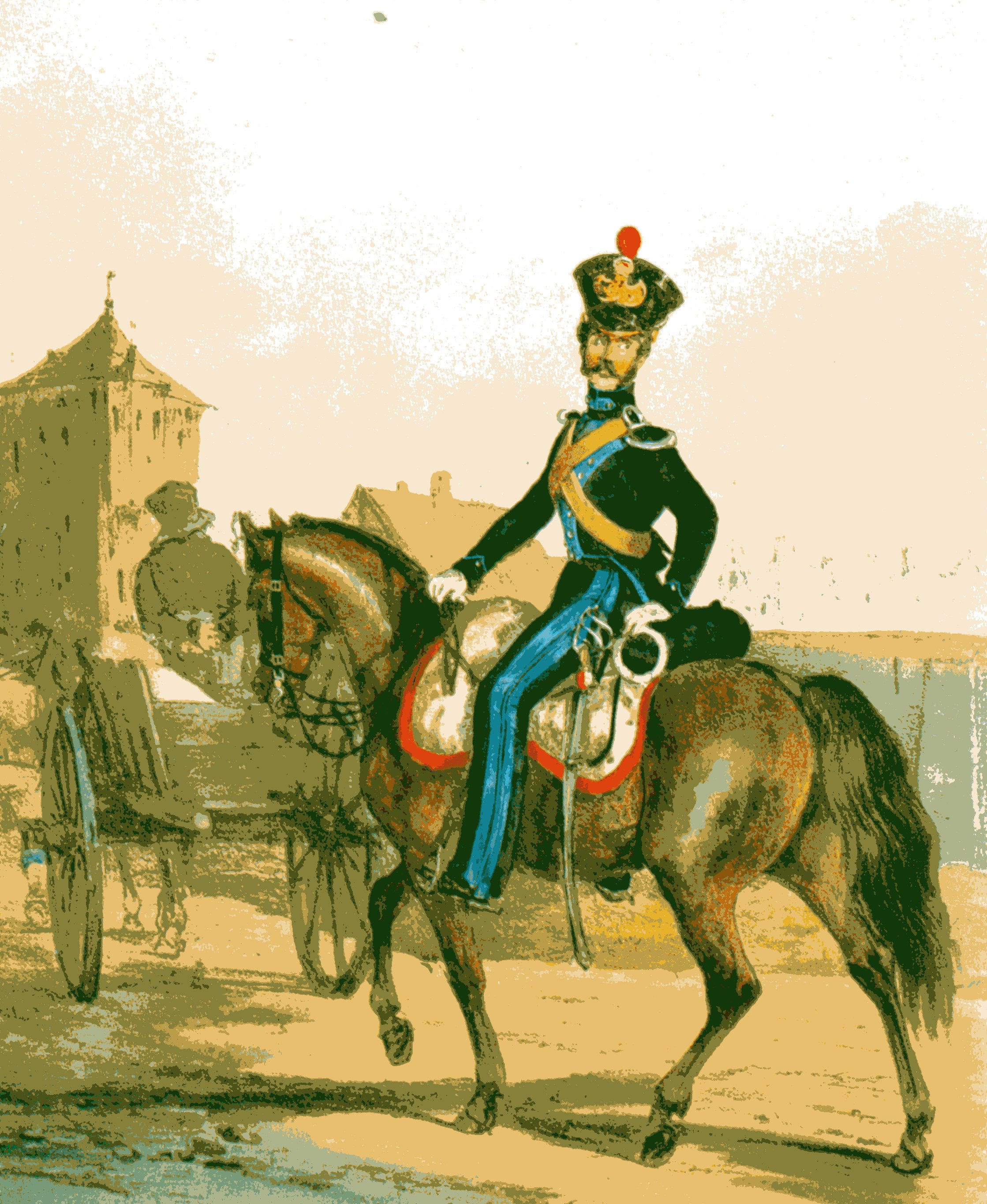 Gendarm des Großherzoglich Mecklenburg Schwerinschen Gendarmeriekorps um 1840. Dunkelblaues Kollett, vermutlich graue Hosen, schwarzer Tschako